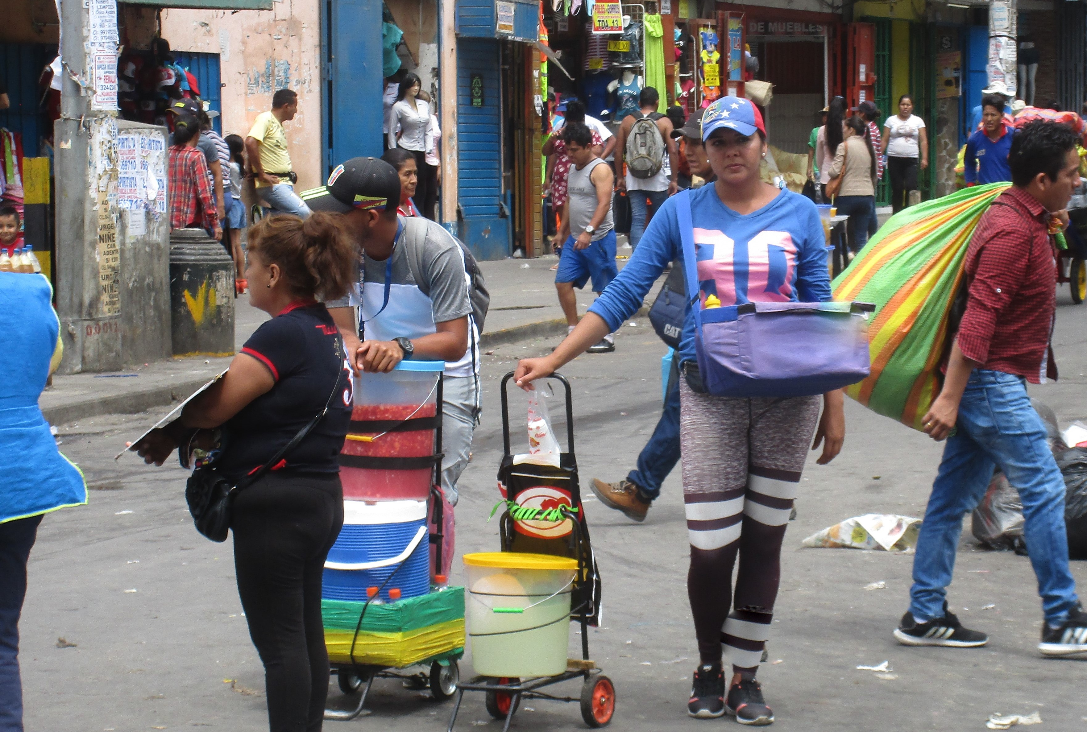 Inmigrantes venezolanos vendiendo arepas en Mesa Redonda, Lima Perú